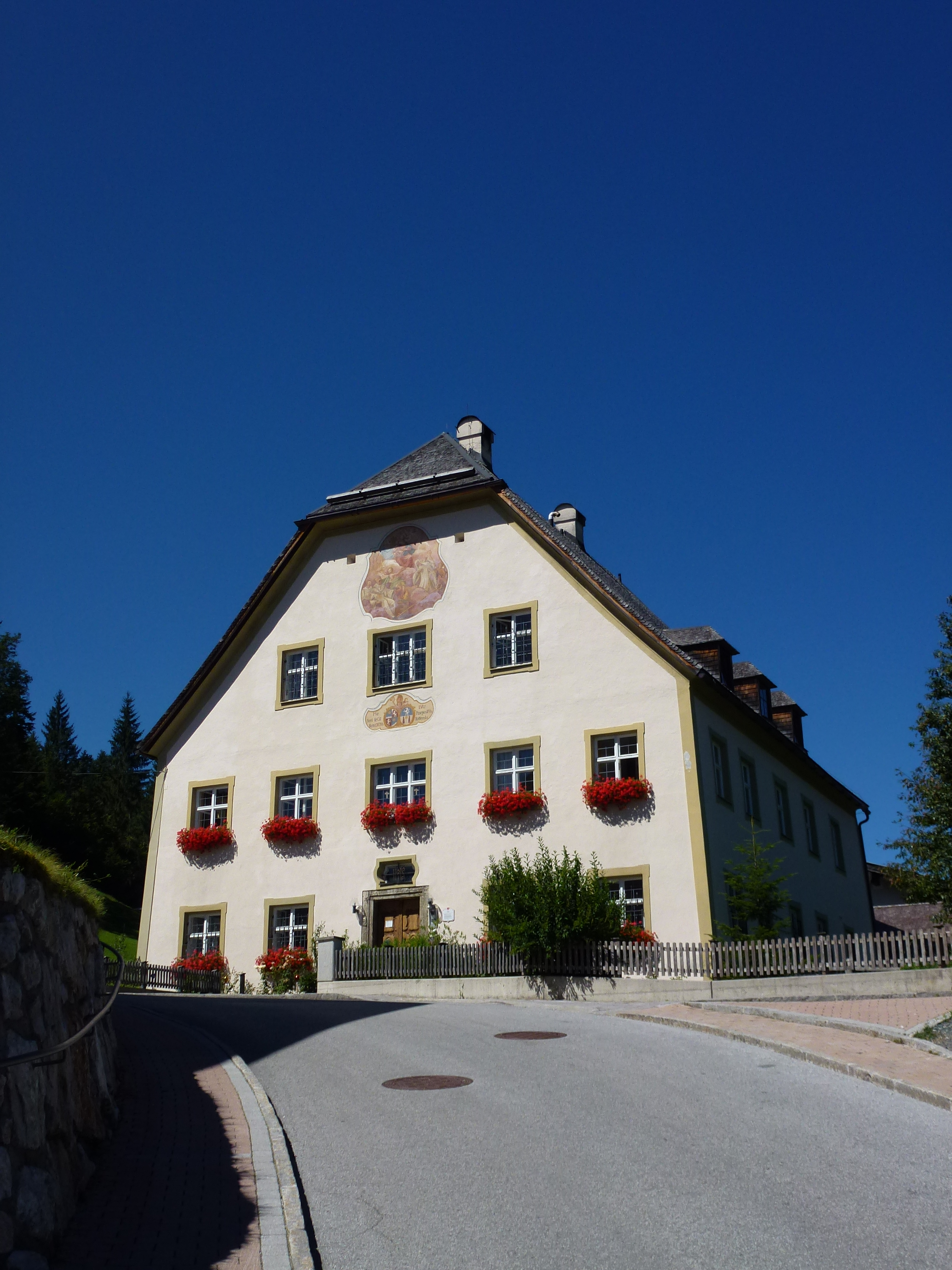 Widum - Kirchweg 4, Fieberbrunn